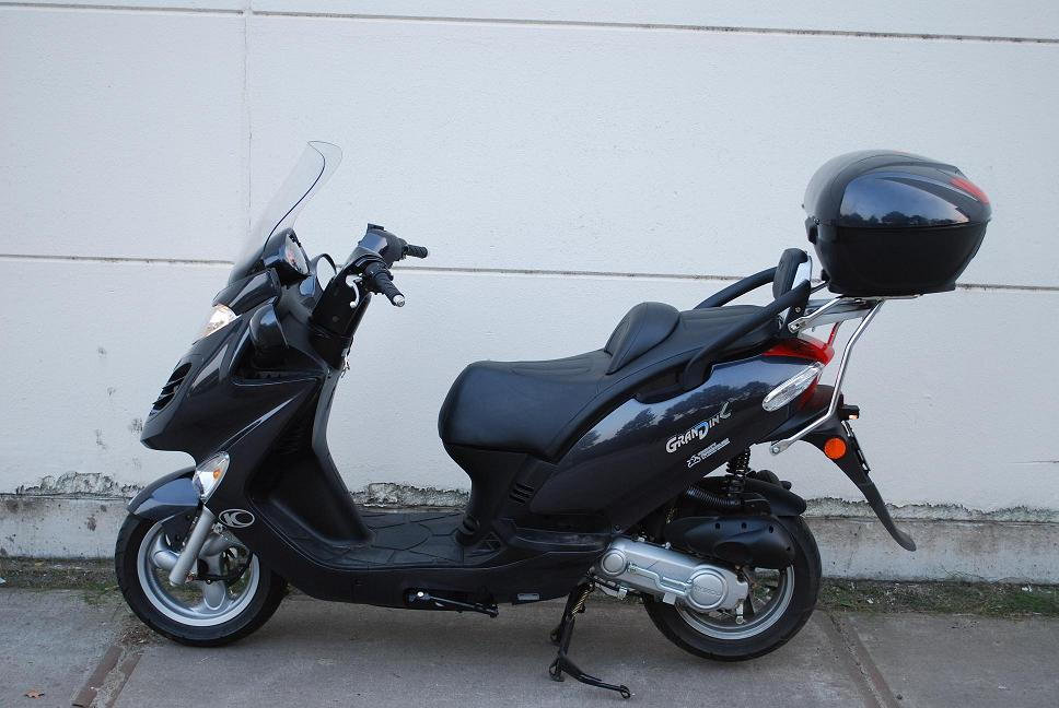 Kymco Grand Dink 50 cc